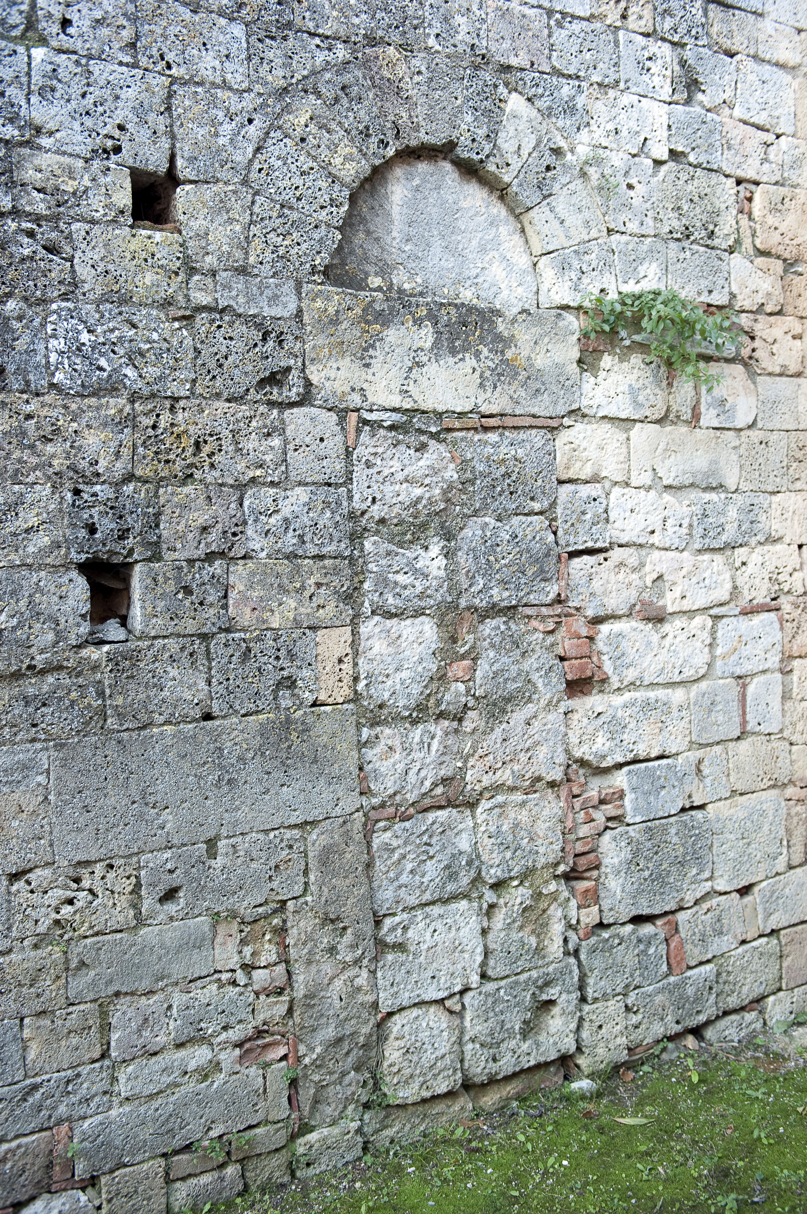 Portale laterale della chiesa dei Santi Maria e Gervasio a Marmoraia, Casole d'Elsa.